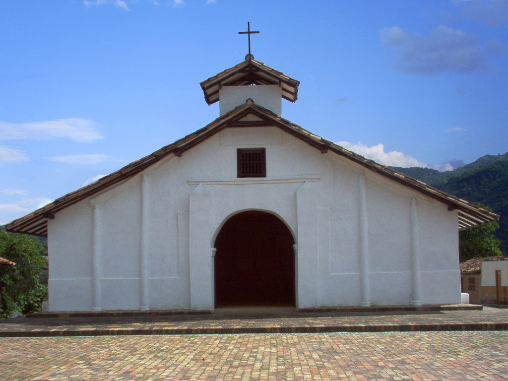 Capilla de Nuestra Señora de la Candelaria, Montebello, Antioquia. Colombia